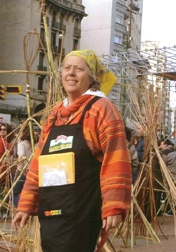 Mariela Celentano en 2009